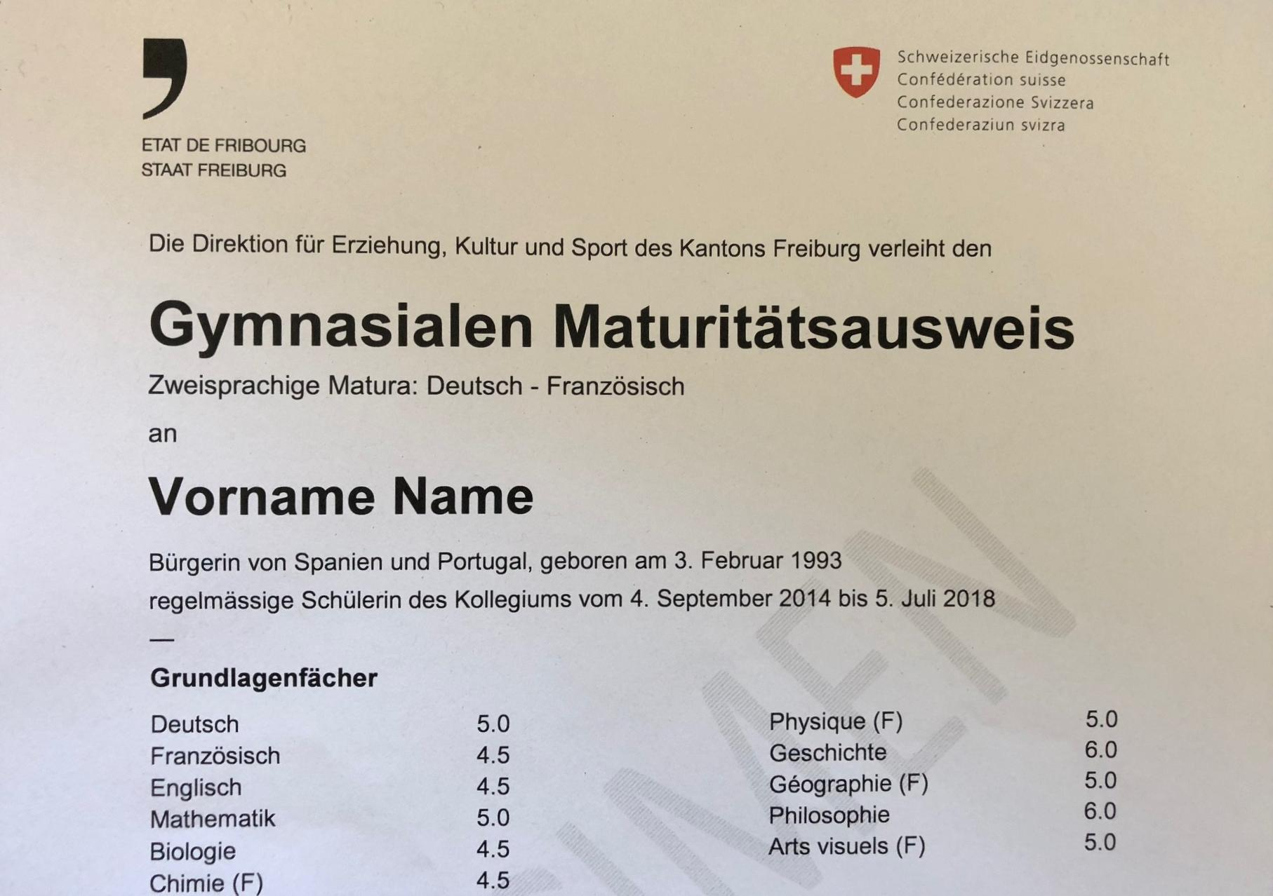 Zweisprachige Matura